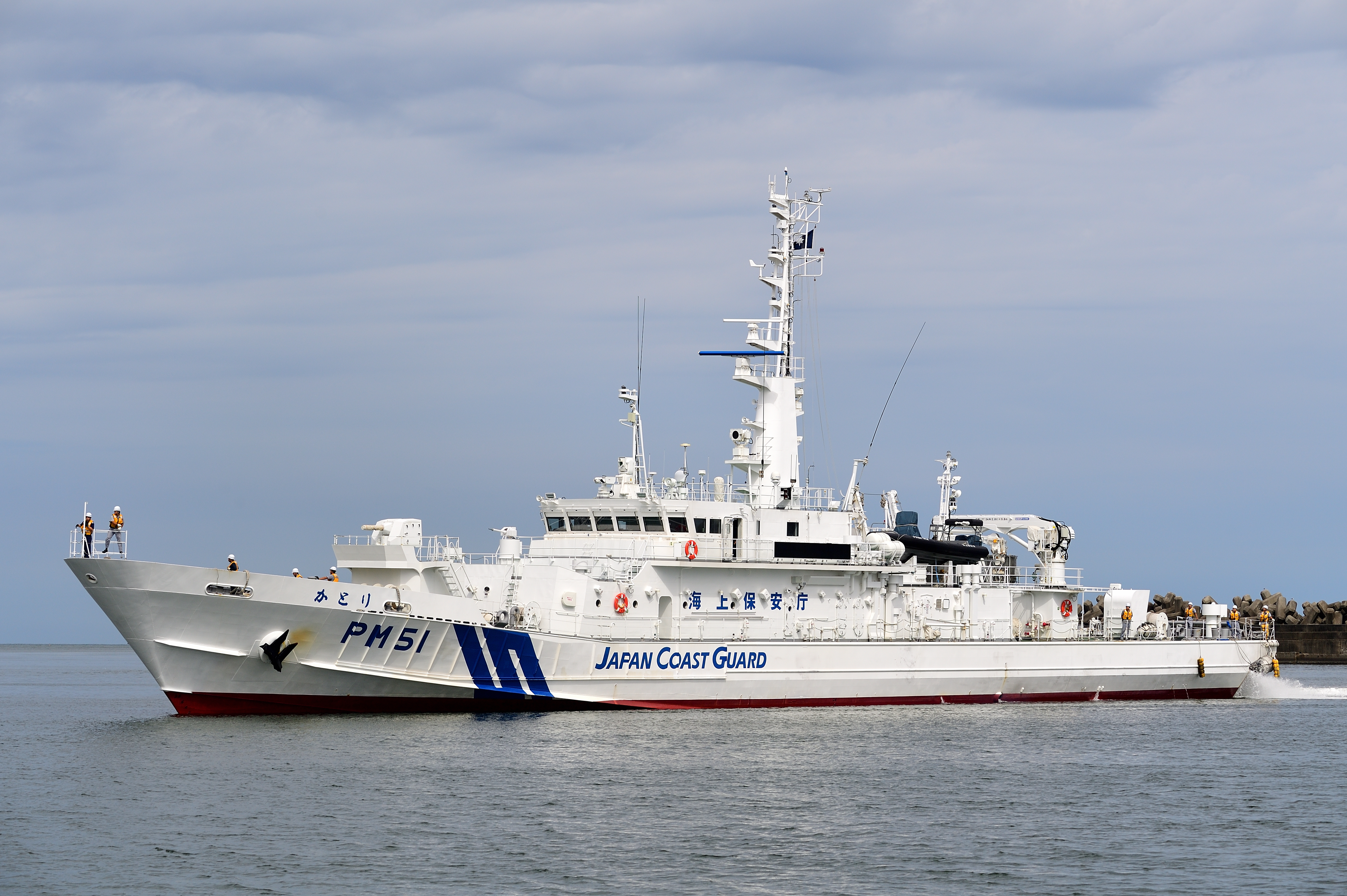 海上保安庁の巡視船「かとり」PM51（船首改修後）。